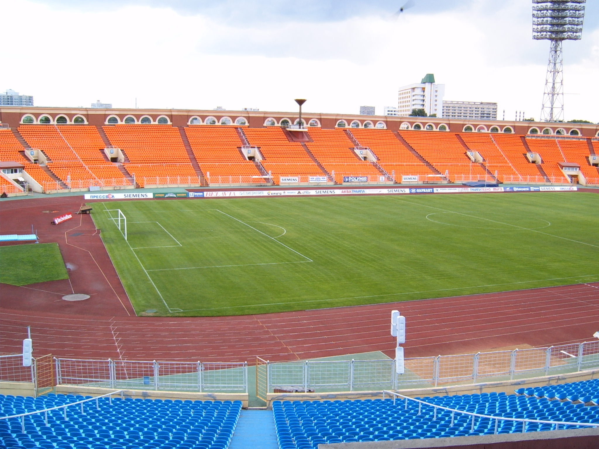 Стандион Динамо в Минске